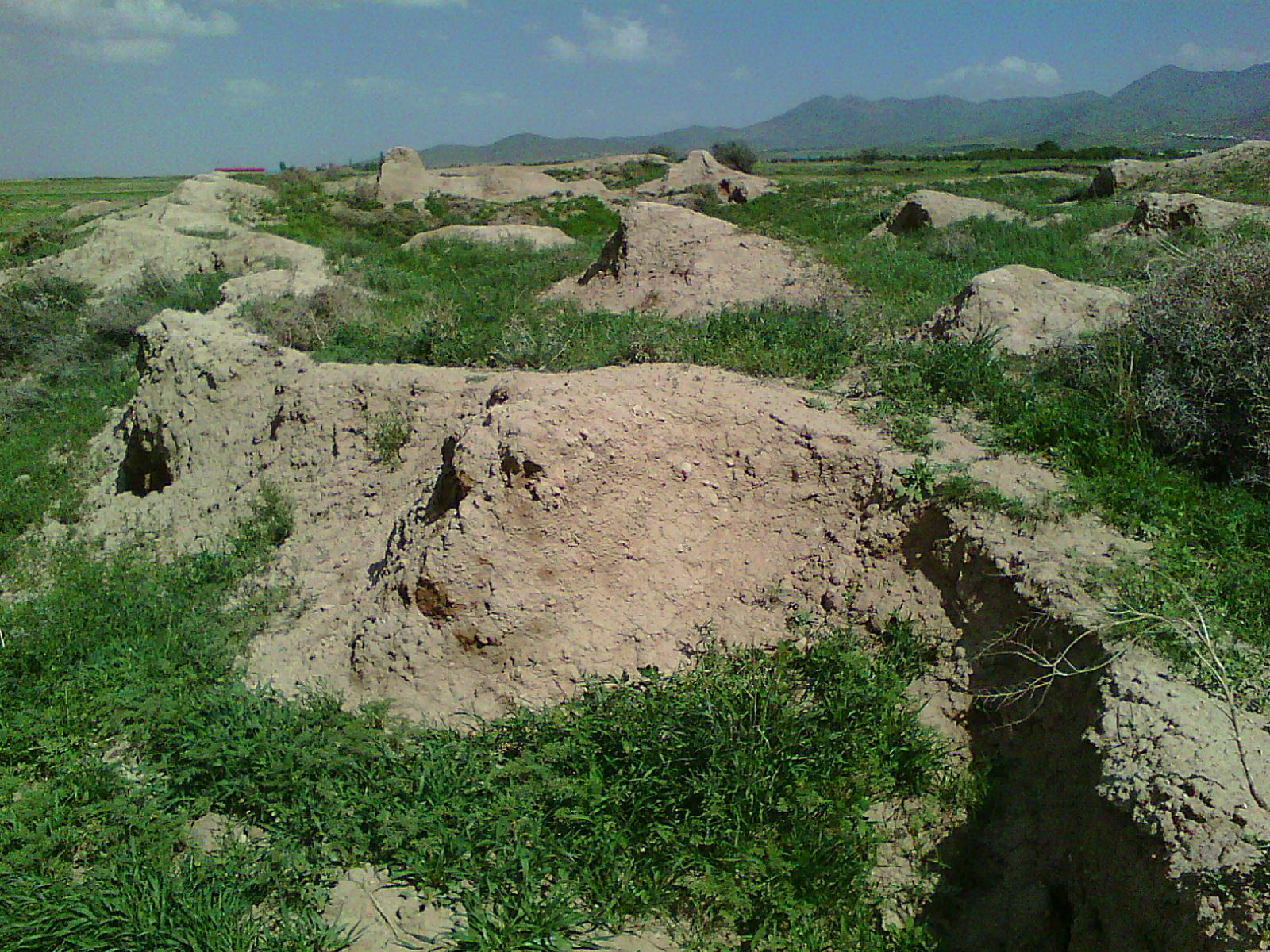 بقایای یک کارونسرای مادی